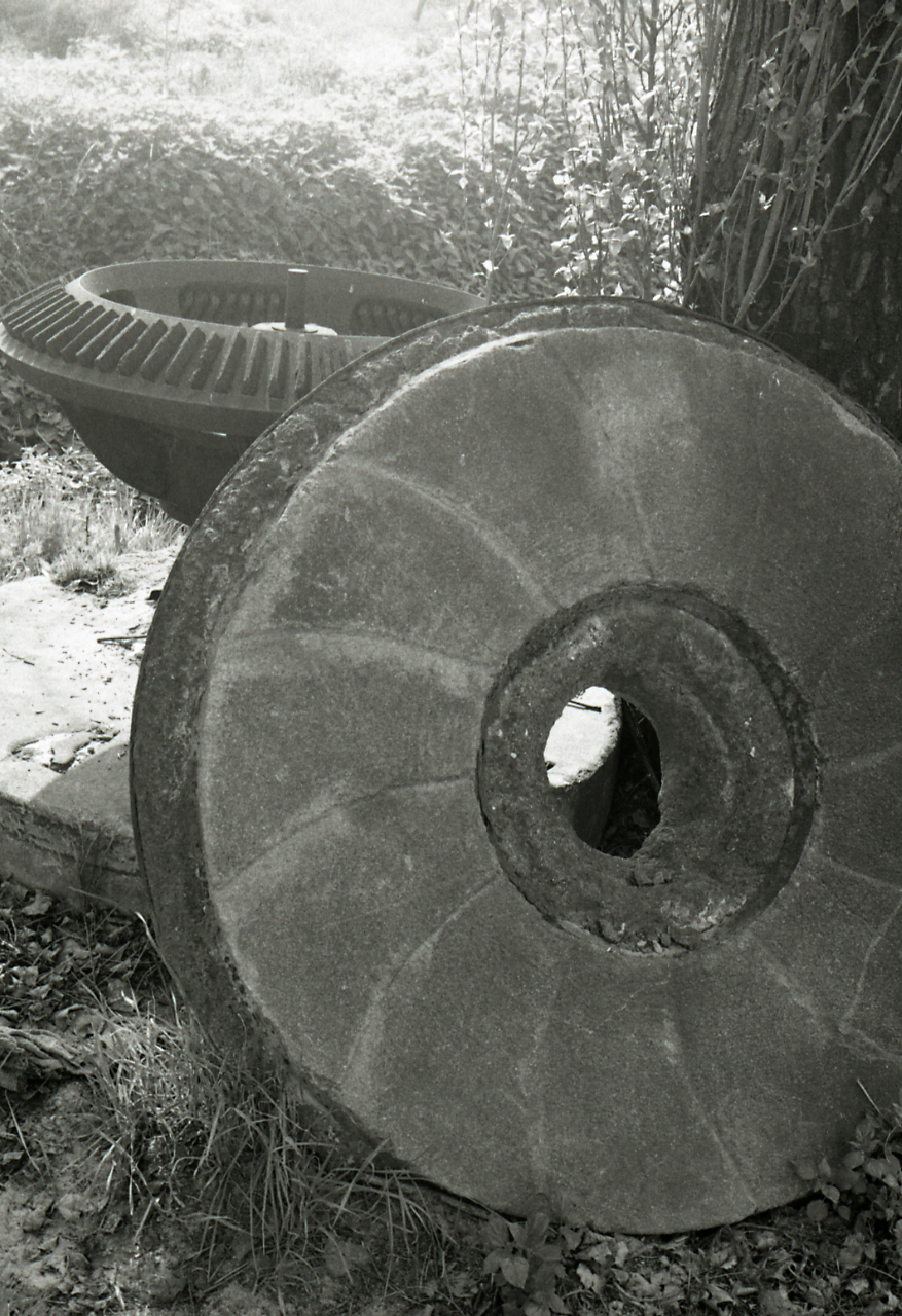 Imola (territorio). Canale dei Molini: vedute del canale e particolari della ruota del mulino e di una macina. Servizio fotografico : Imola, 1974 / Paolo Monti. - Strisce: 7, Fotogrammi complessivi: 36 : Negativo b/n, gelatina bromuro d'argento/ pellicola ; 35 mm. - ((Sul portanegativi: N[I]K[MA]T FP4. - . - Occasione: Documentazione per la pubblicazione: Varignana Franca, 2, "Mappe agricole e urbane del territorio bolognese dei secoli 17. e 18" in "Le collezioni d'arte [...]", Bologna, Cassa di Risparmio di Bologna-Edizioni Alfa, 1974. - : IV. Commesse/ Fattura n. 13 (1974/06/24), presso Archivio Paolo Monti. - Fonte: Agenda di Paolo Monti: Leica 1501-3000 Controllo numerazione (1950-1978), presso Archivio Paolo Monti. - Fonte: Monografia di Varignana Franca (a cura di): 2, Mappe agricole e urbane del territorio bolognese dei secoli 17. e 18 in Le collezioni d'arte della Cassa di Risparmio in Bologna, Bologna, Cassa di Risparmio di Bologna-Edizioni Alfa (1974). - Fonte: Fattura di Paolo Monti